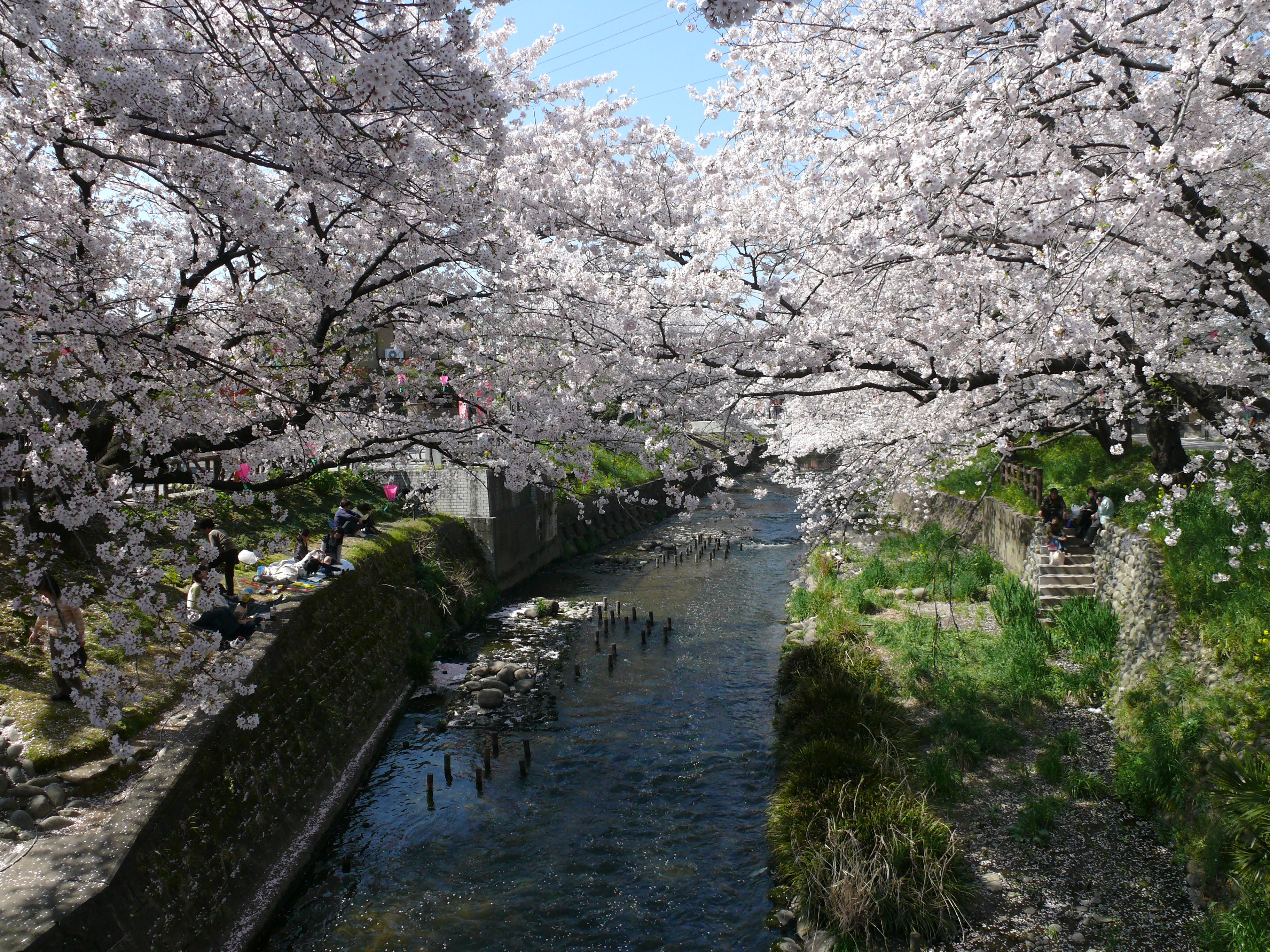 愛知県岩倉市。彦太橋付近の五条川。